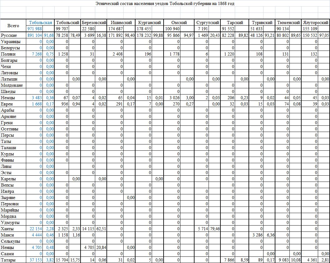 Список населённых мест Тобольской губернии